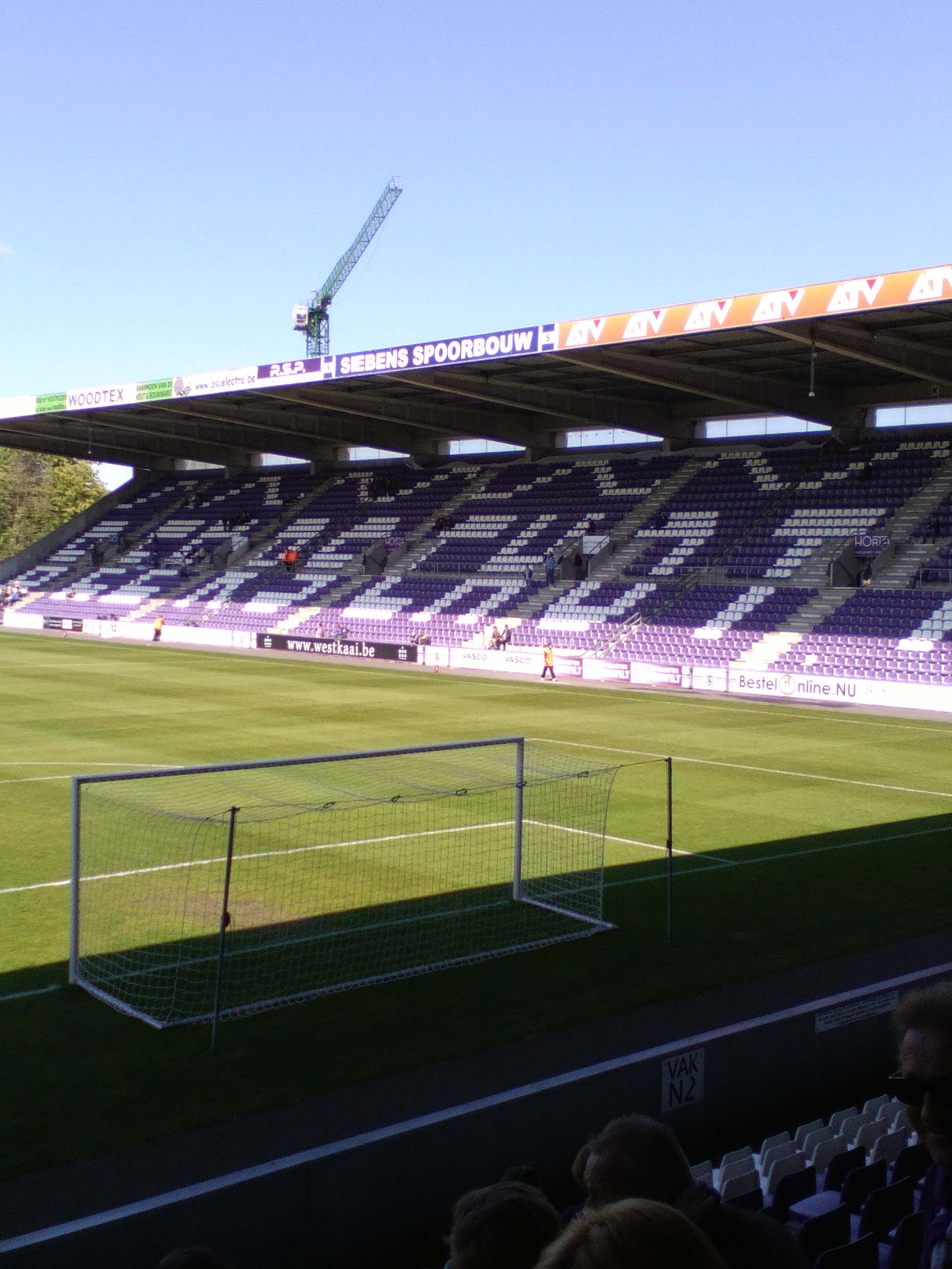 Het stadion van KFCO Beerschot Wilrijk